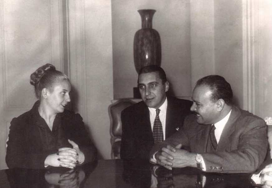 Eva Perón y el dirigente gremial José Espejo. Antes del 1952.